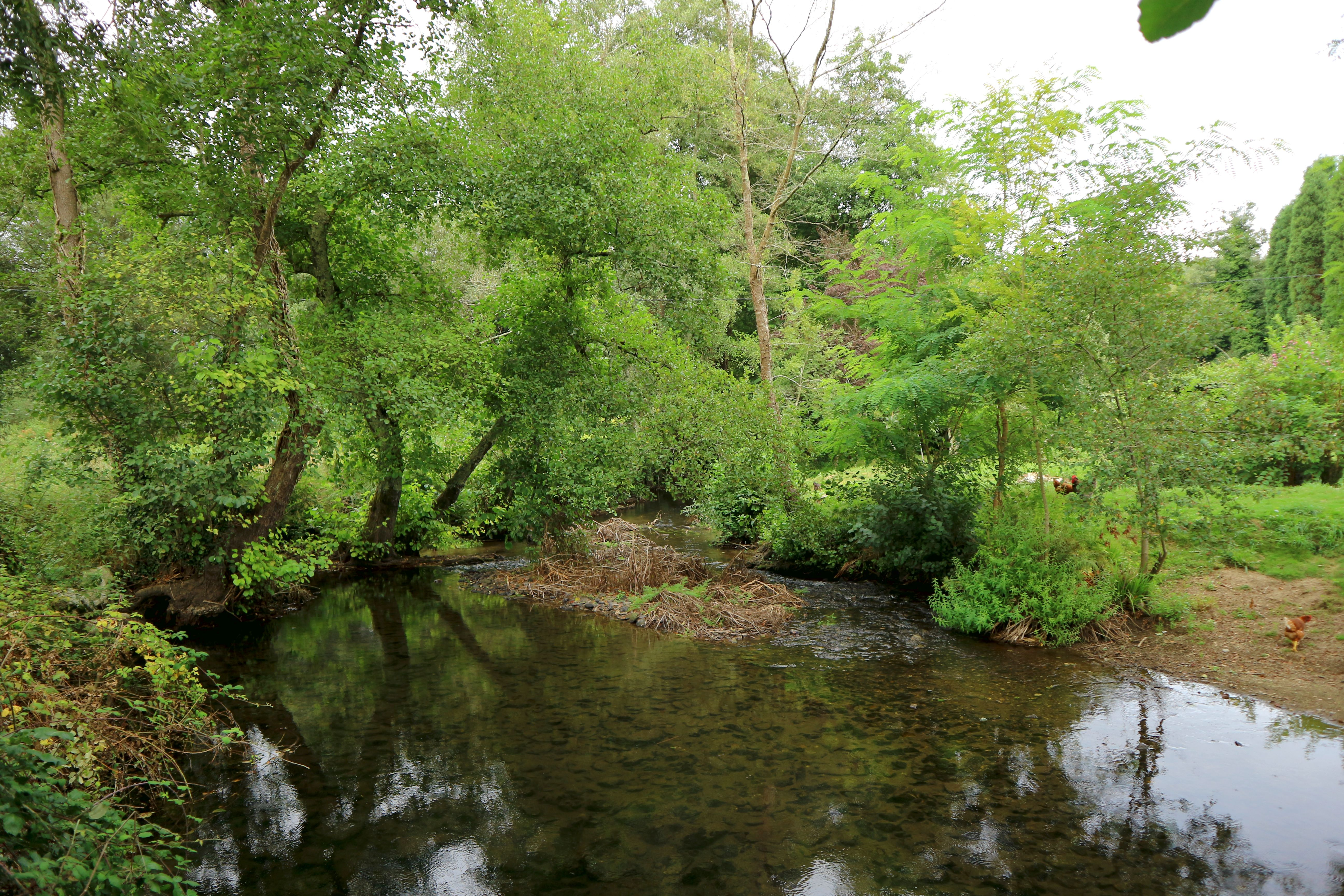 Río Barcés en San Vicente de Vigo, Carral, e Mabegondo, Abegondo.